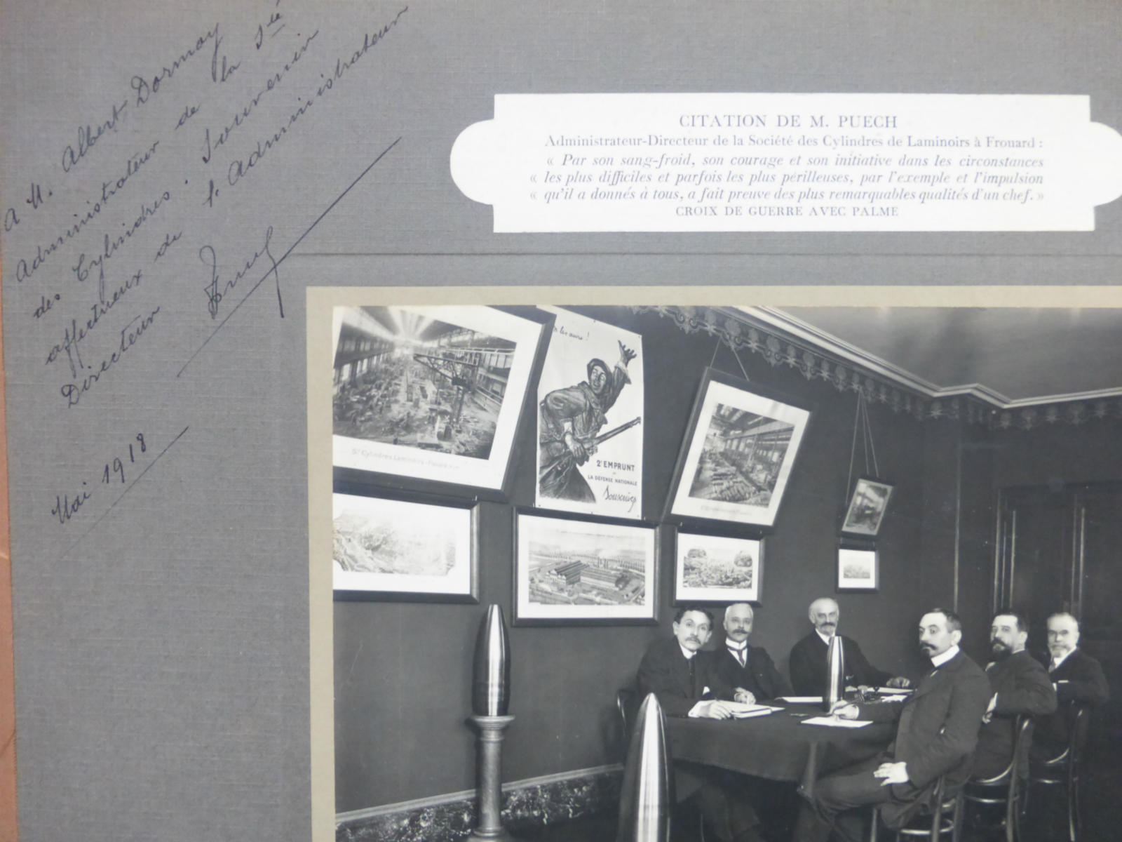 Conseil d'administation de la SACLA 1918